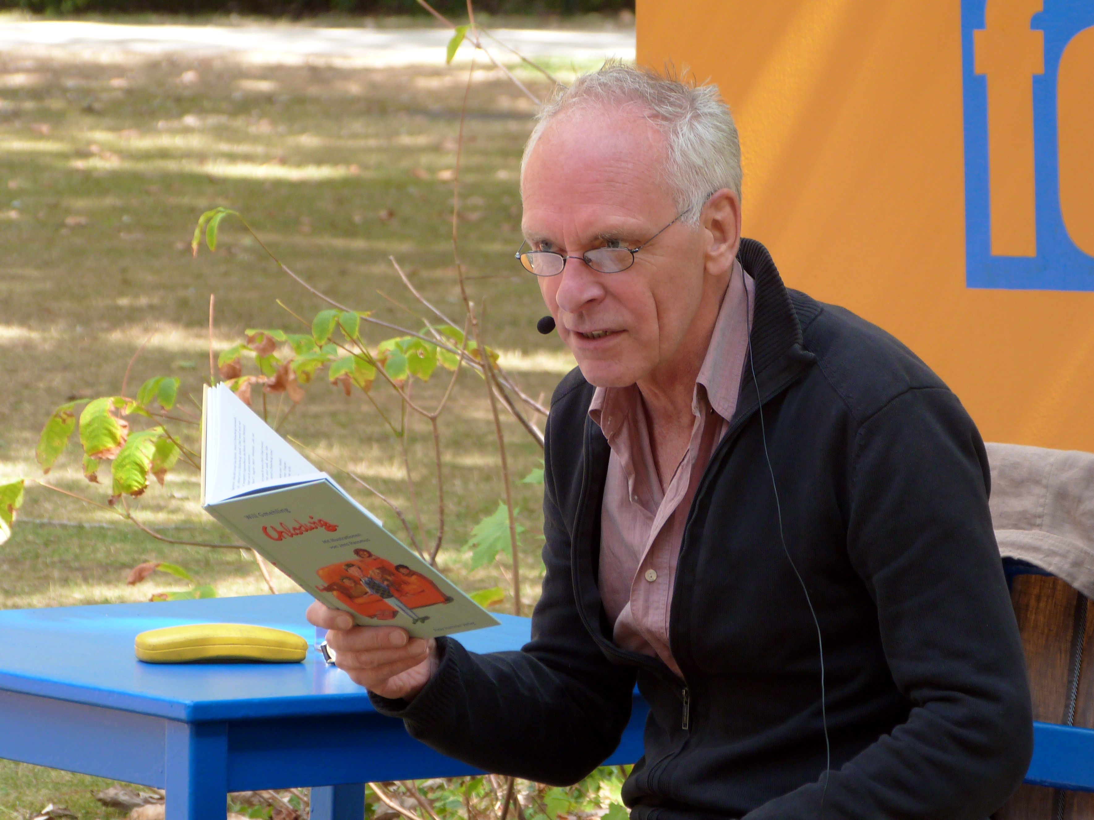 Der Kinderbuchautor Will Gmehling bei einer Lesung auf dem Erlanger Poetenfest 2018.